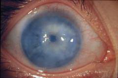 Глаукома